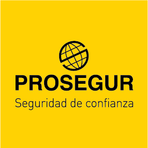 Logo de la empresa de seguridad Prosegur